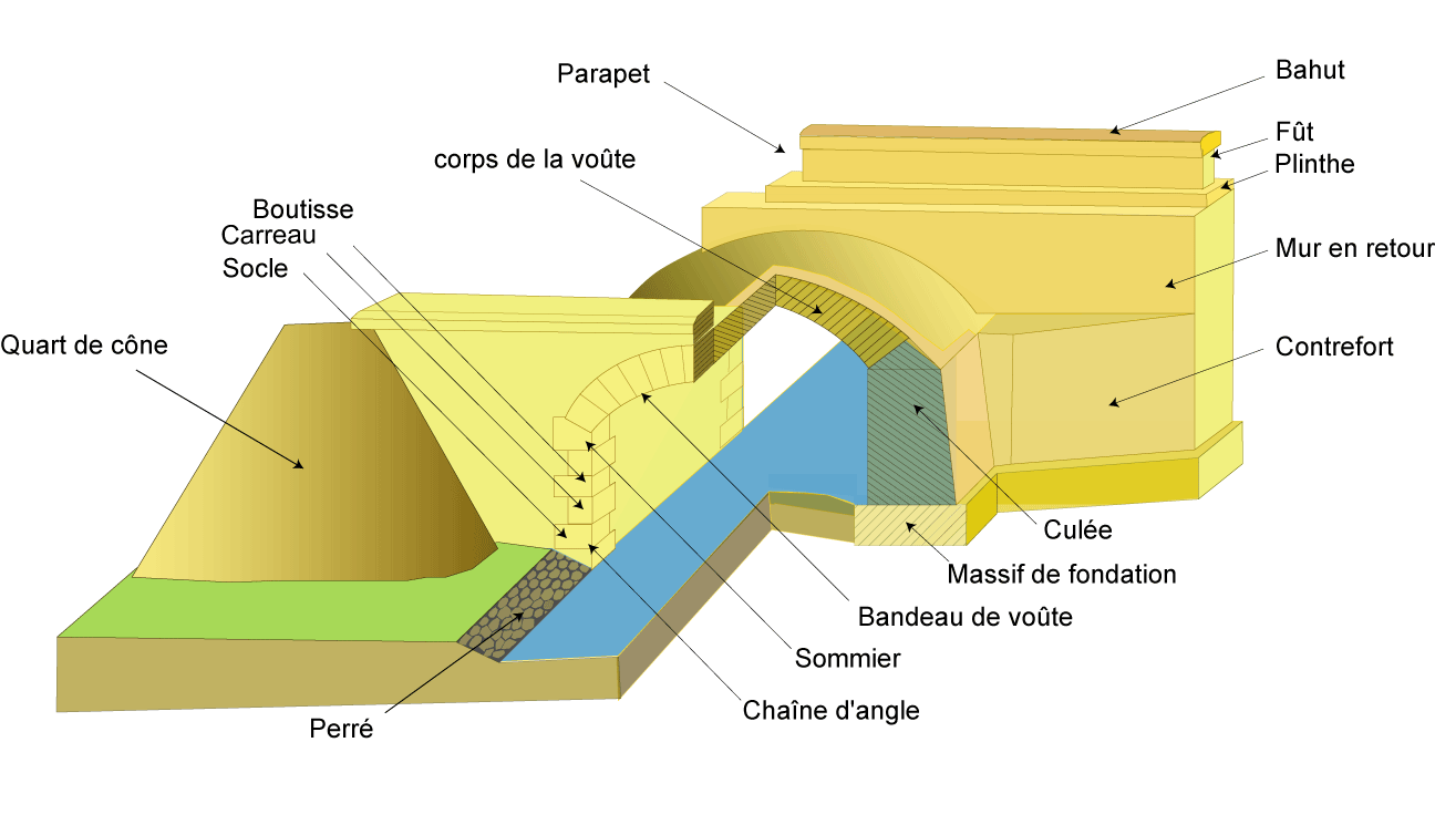 Schéma éclaté de pont en maçonnerie